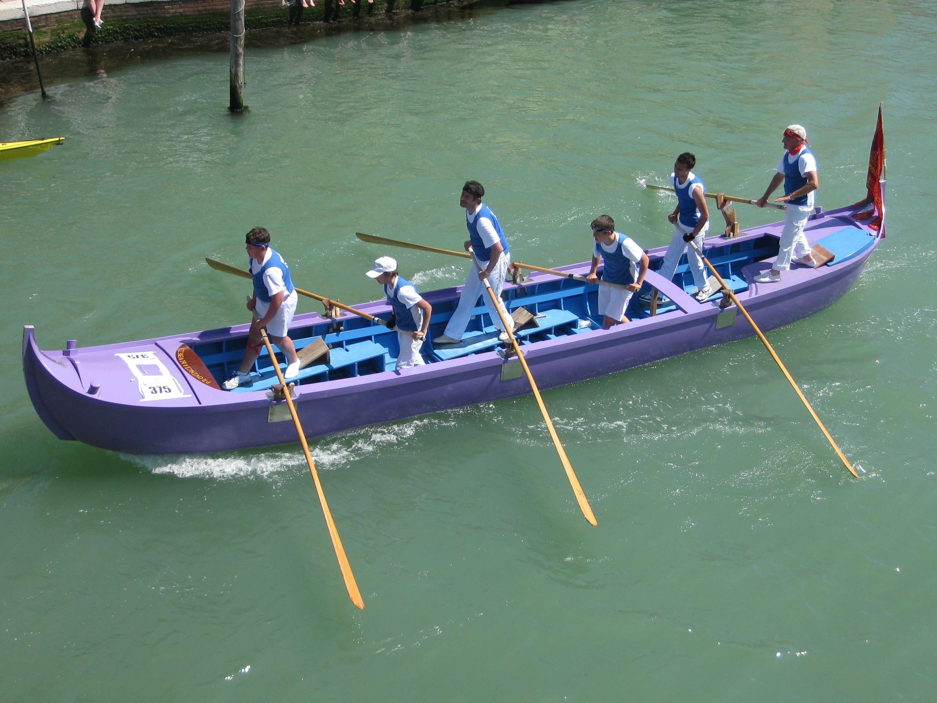 Vogalonga 2010 - Caorlina